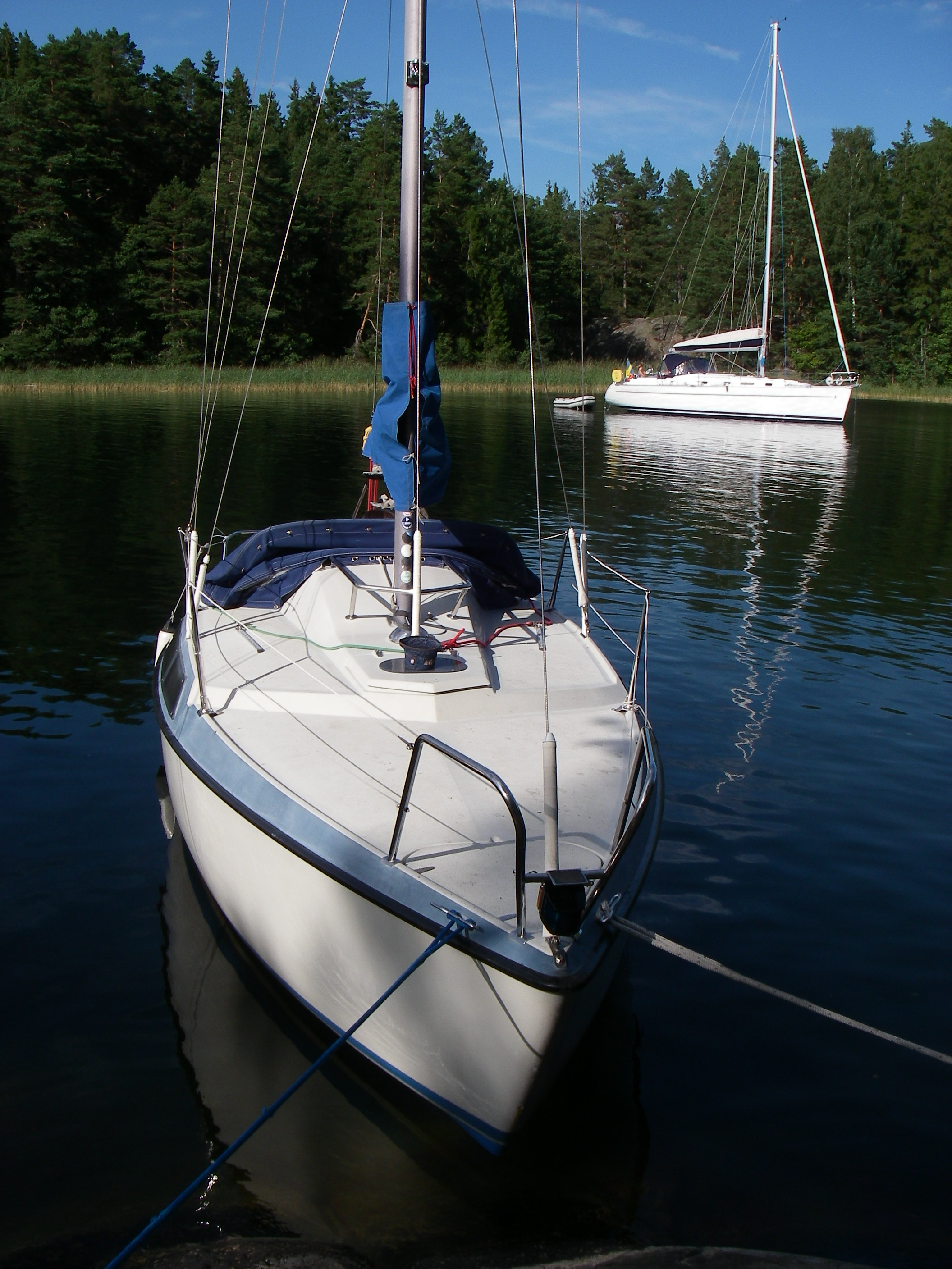 Maxi 77